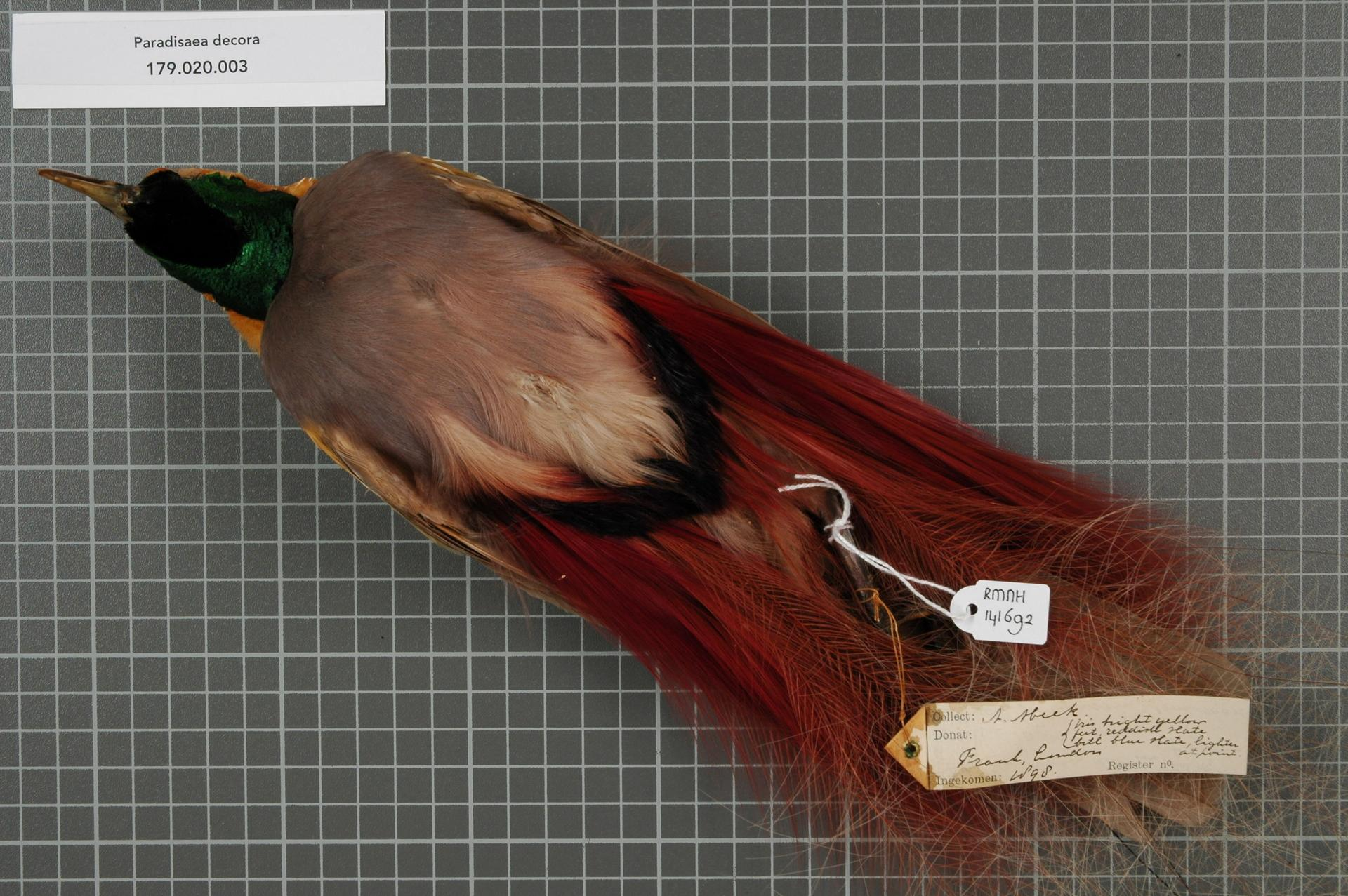 Paradisaea decora Salvin and Godman, 1883